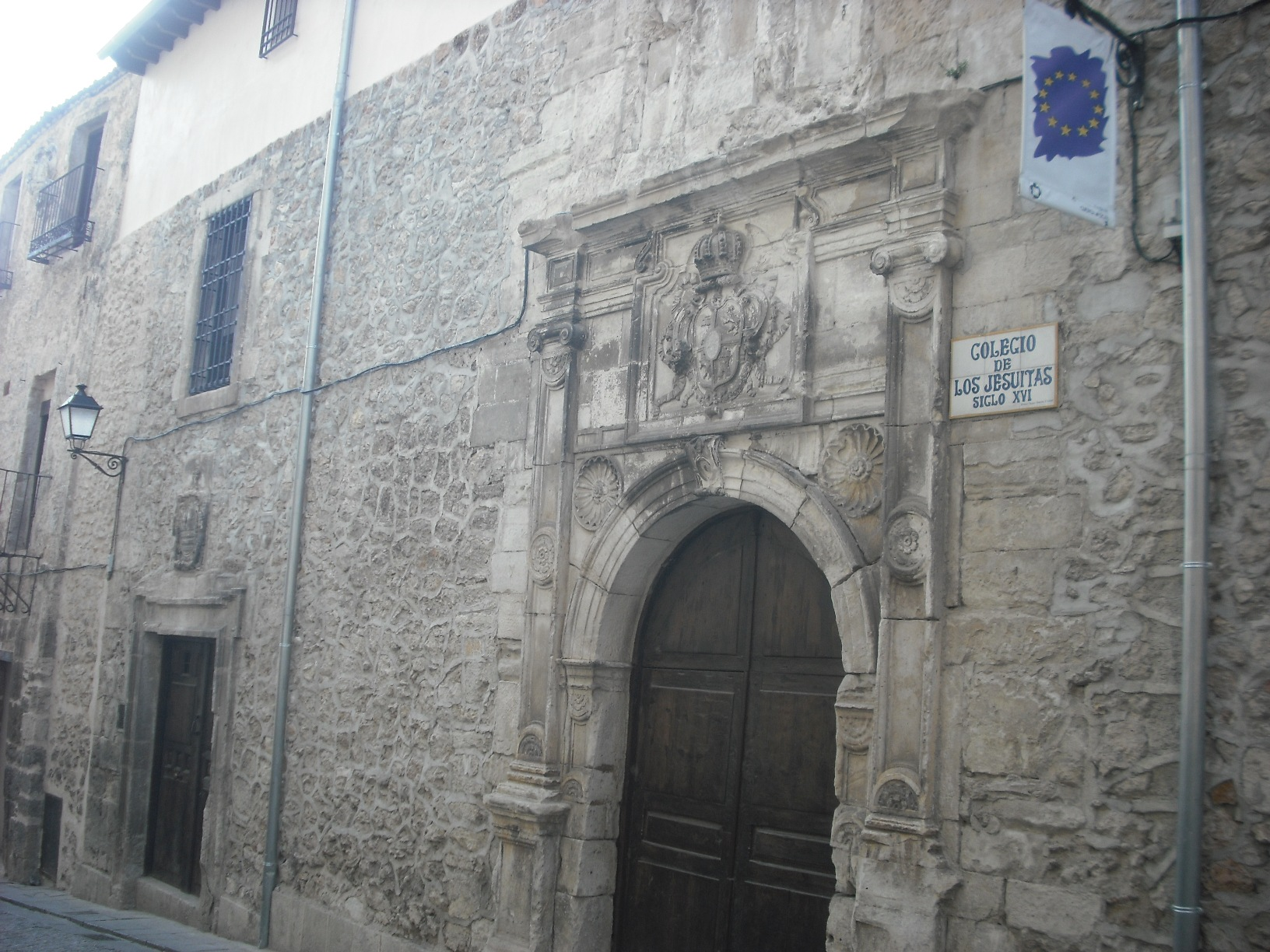 Antiguo Colegio de los Jesuitas.